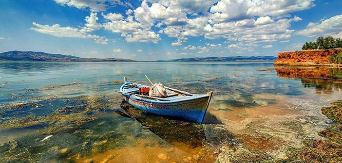 Marmara